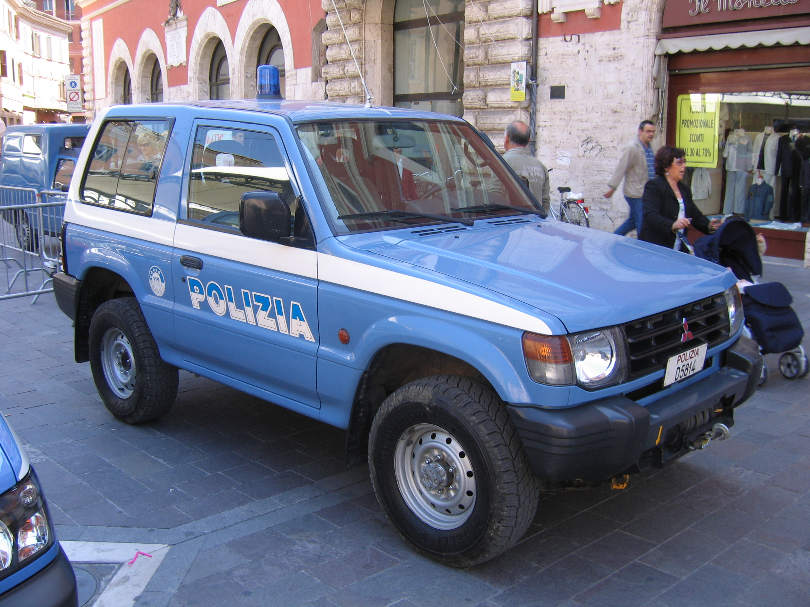 Italian police SUV